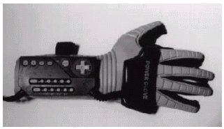 Rotografia tirada para registrar